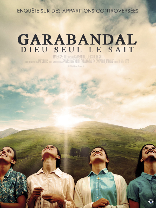 Garabandal